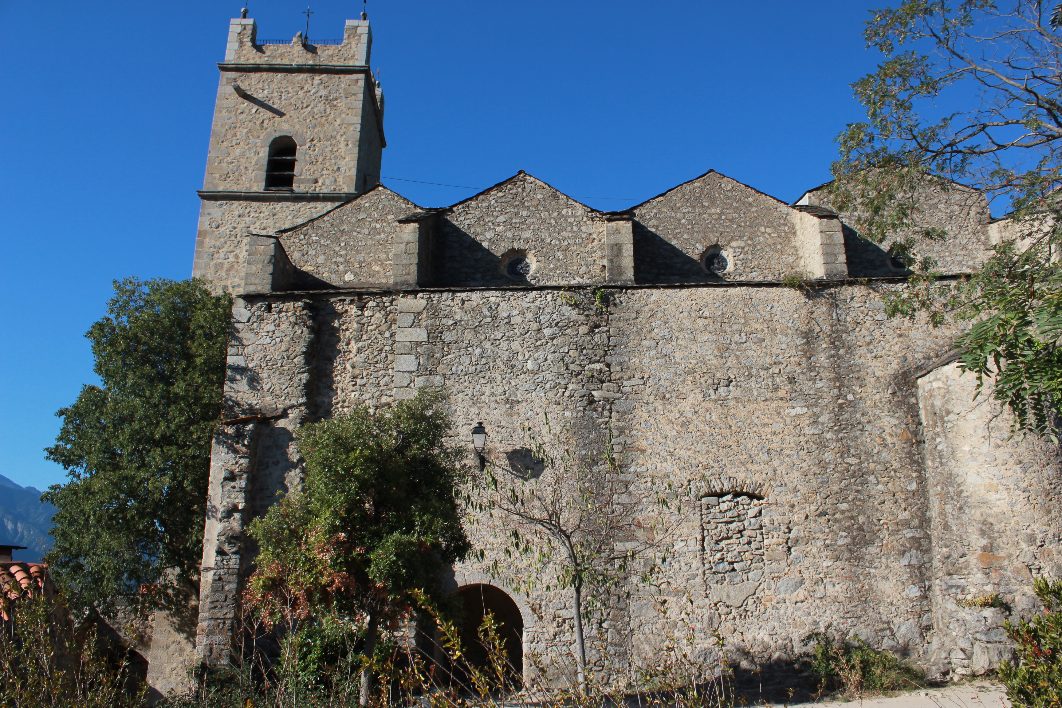 Eus, Pyrénées-Orientales,un des plus beaux villages de France